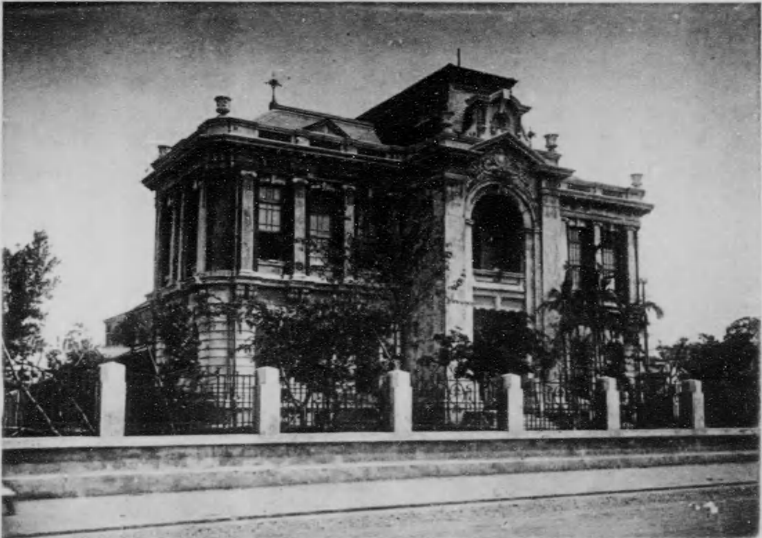 臺南公館，即臺南公會堂